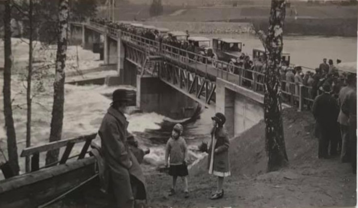 Marielundsbron över Österdalälven, troligen föreställande invigningen. Fotograf okänd, privat samling.